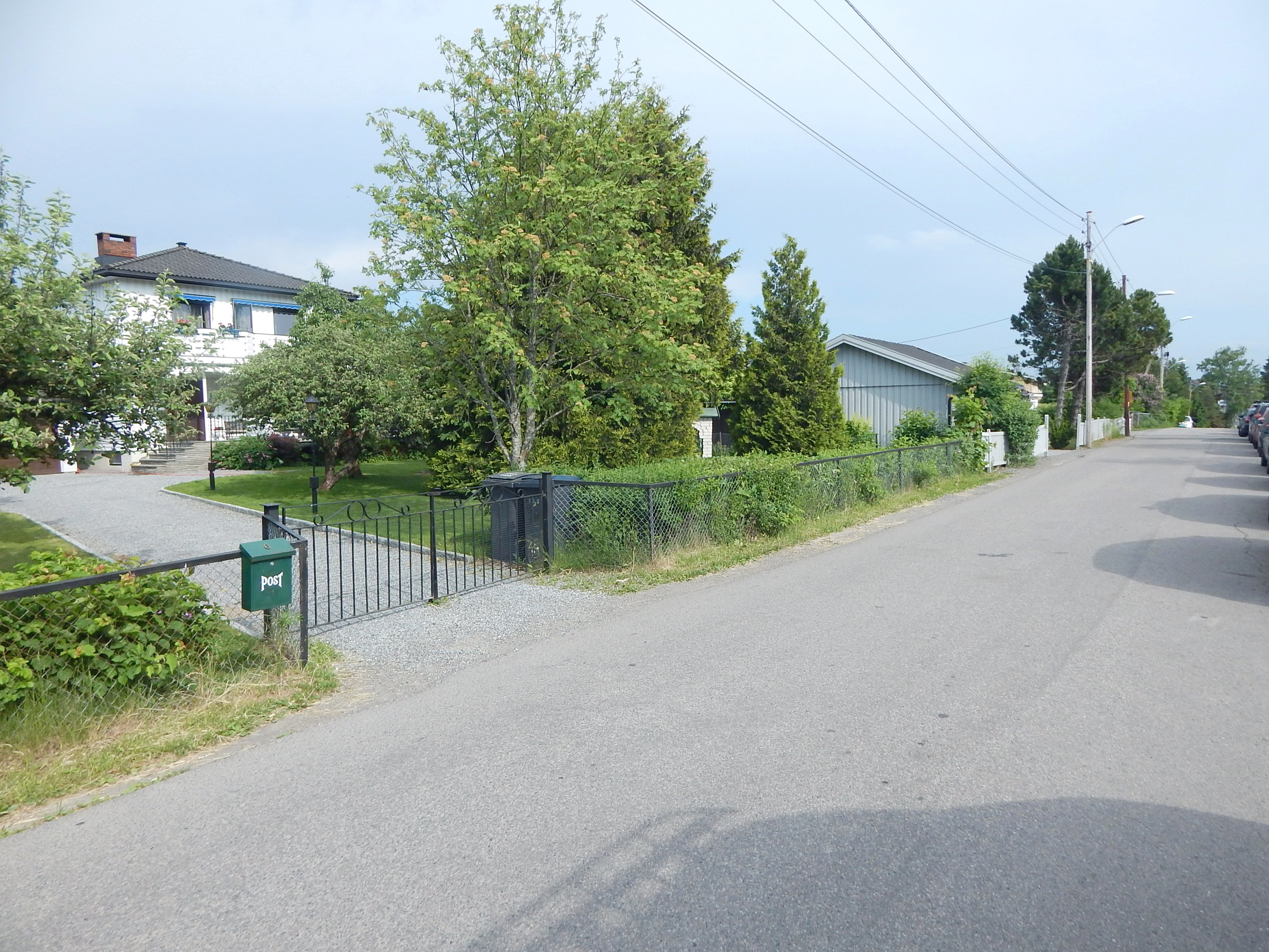 Høgdaveien